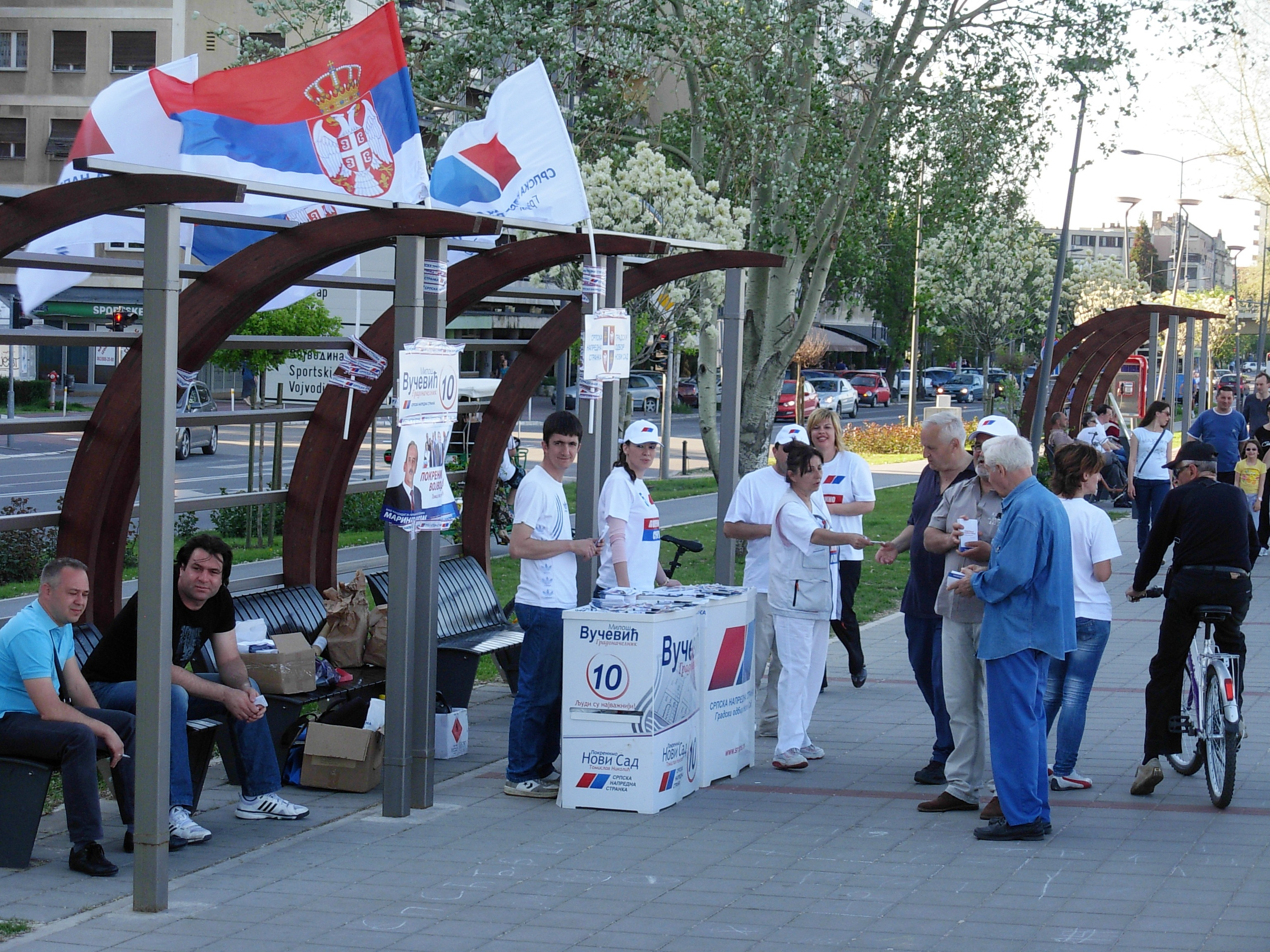 Štand Srpske napredne stranke na Sunčanom keju u Novom Sadu pred izbore 2012. godine.